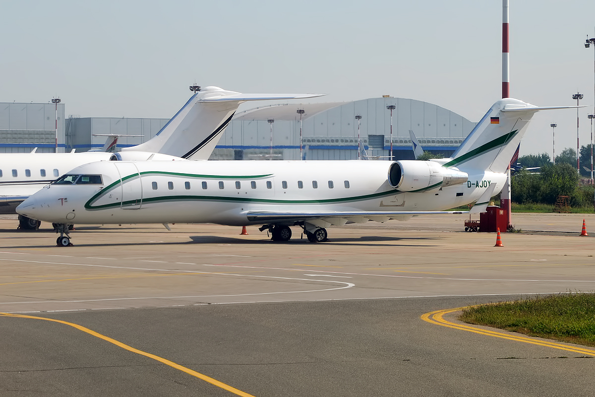 Air X Charter, D-AJOY, Bombardier Challenger 850